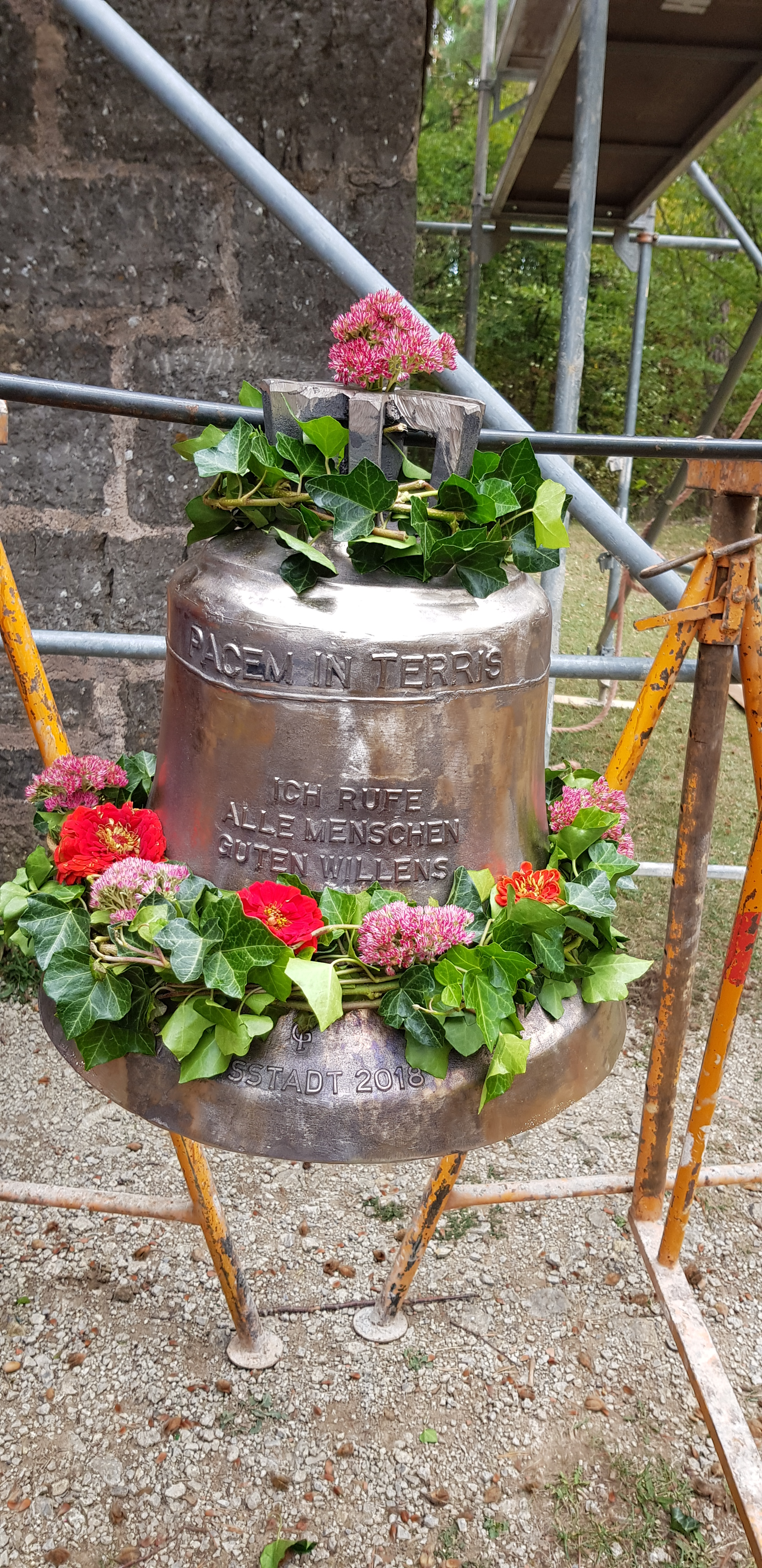 Die Inschrift der neuen Kohlenbergglocke